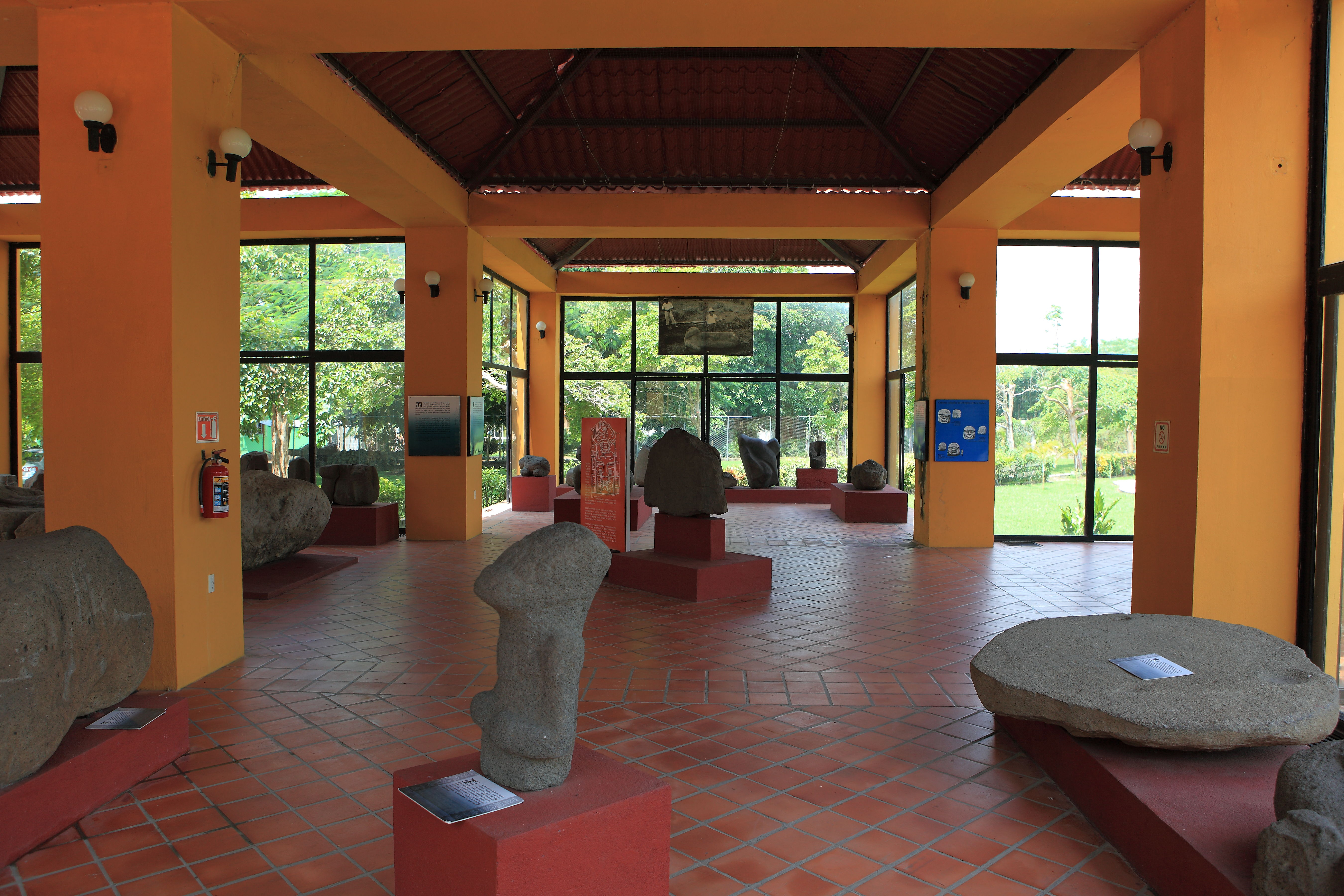 Interior del museo de sitio en la zona arqueológica de Tres Zapotes Veracruz cuna de la cultura Olmeca.